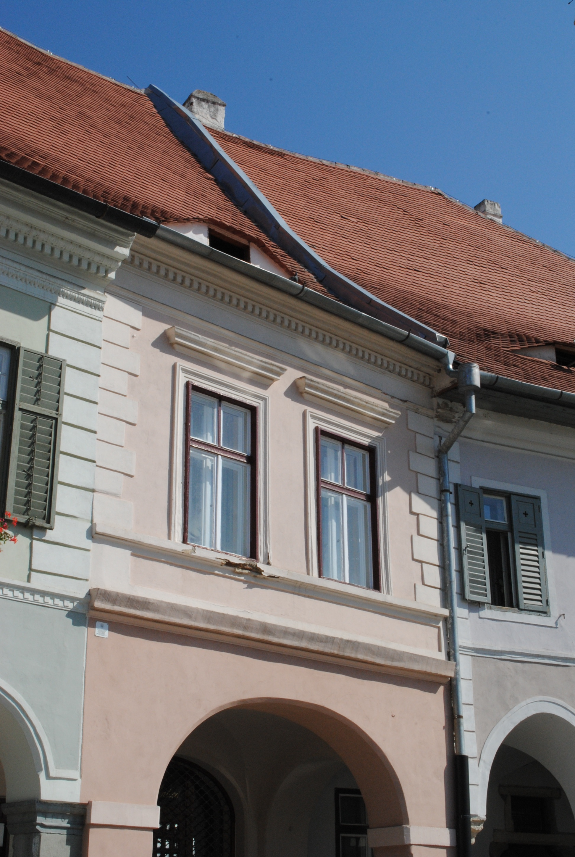 Casă, sec. XVIII